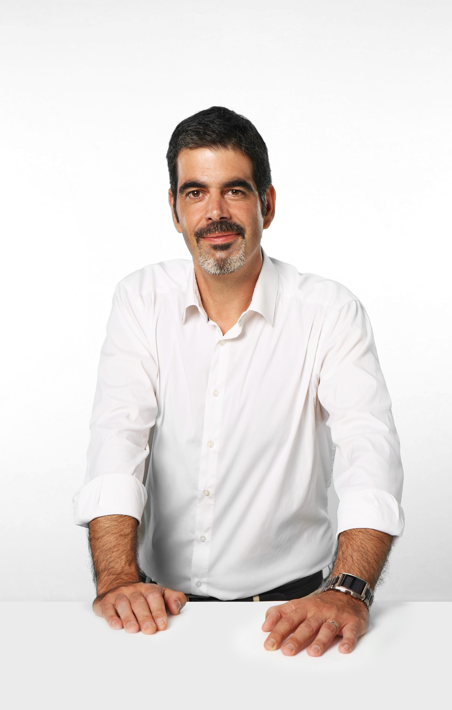 Eneko Goia Laso. 2015eko udal hauteskundeetarako Donostiako alkatetzarako EAJ-PNVren hautagaia.